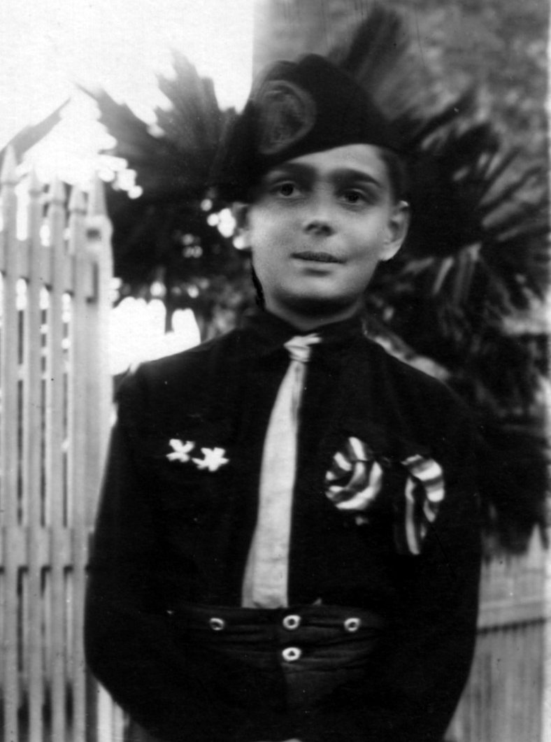 Giorgio Monteforti (1915-1967) from Treggiaia (a village near Pontedera, Pisa), as "Balilla" of Opera Nazionale Balilla, the italian youth (below 14 yrs) paramilitary organization under the fascist regime.